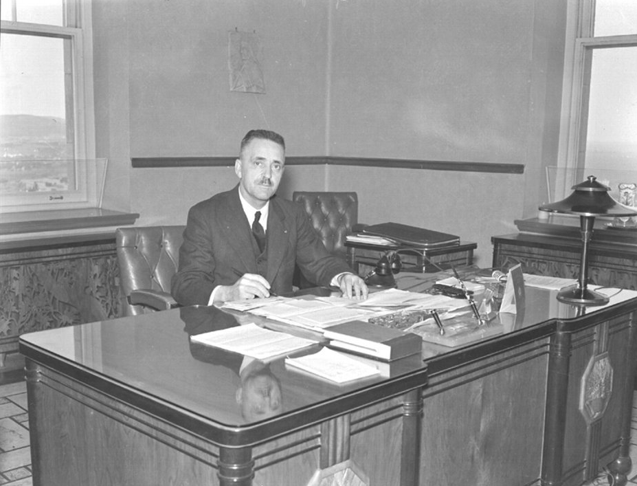 Français cadien: Honorable Bona Dussault, ministre de l'Agriculture, dans son bureau